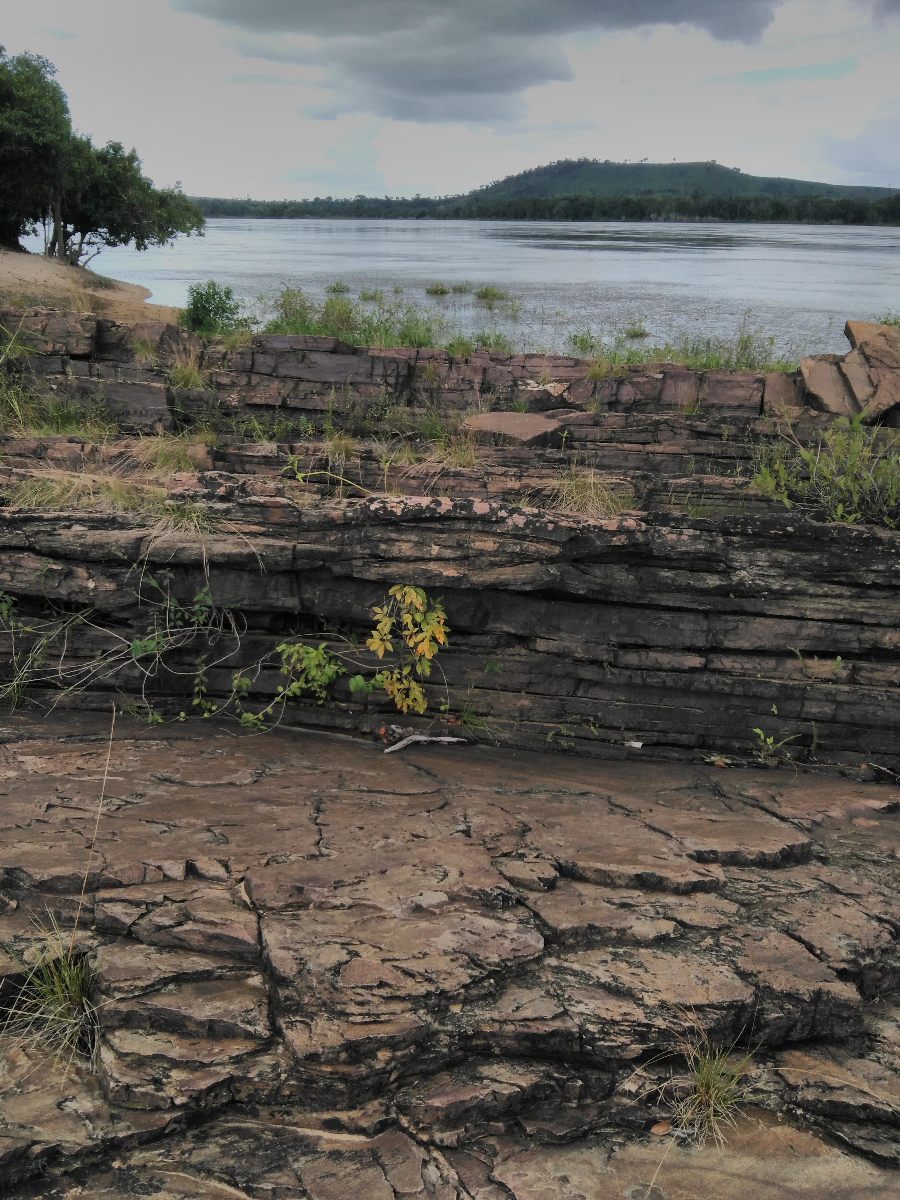 água cristalina rio Araguaia São Geraldo - PA